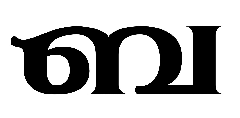 ബ മലയാളം അക്ഷരം